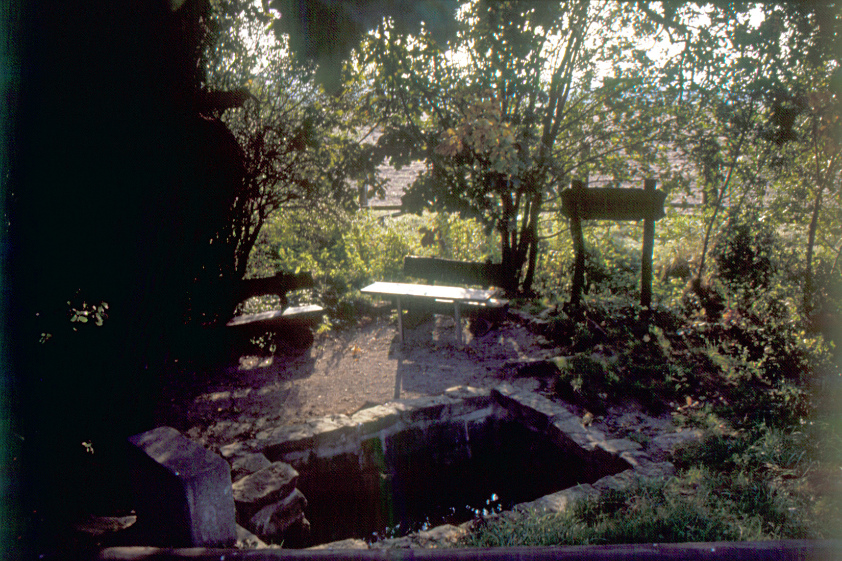 Der Rehrenborn im September 1989. Das ausgekleidete Quellbecken war noch zugänglich und die Sitzgruppe wurde häufig genutzt.